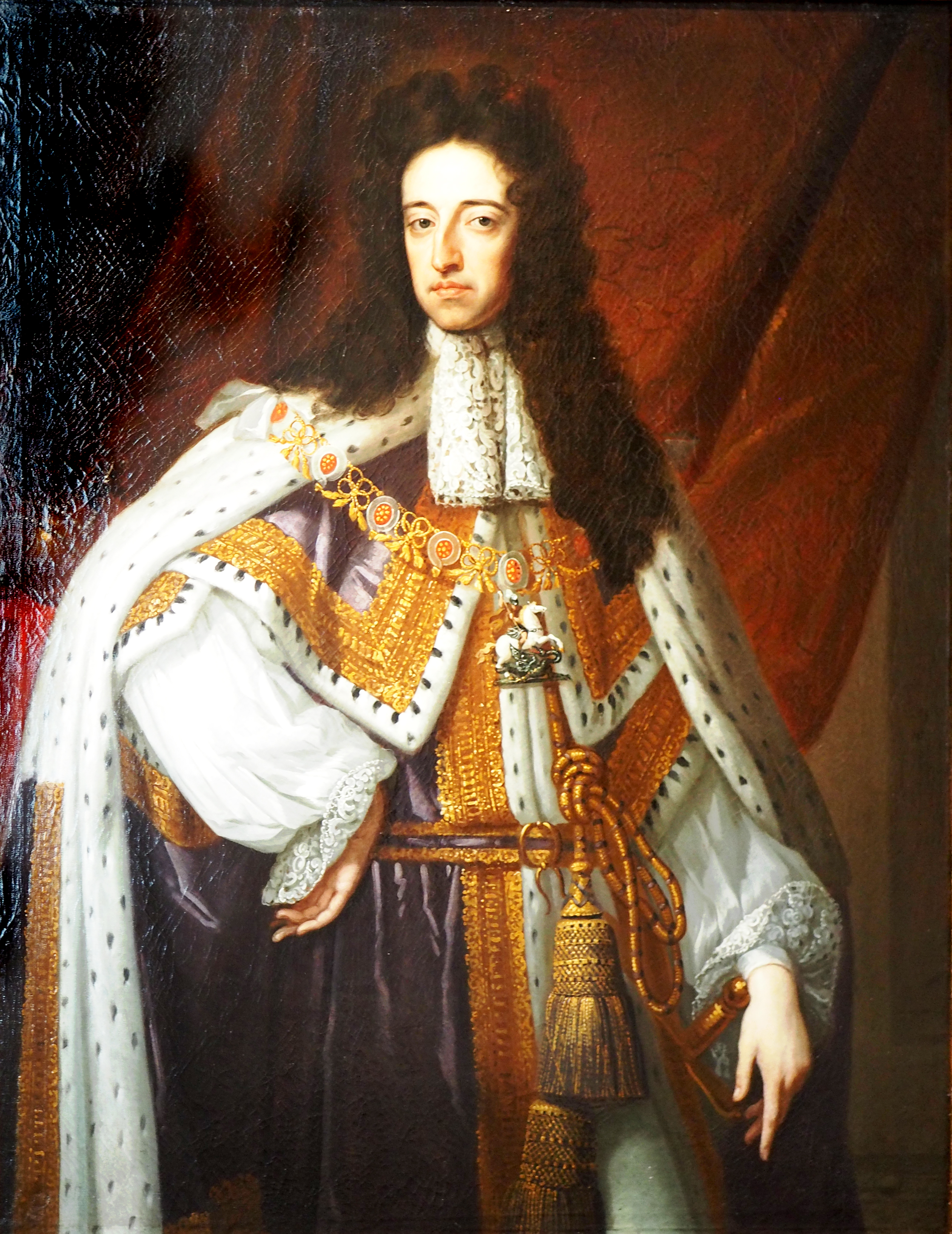 Wilhelm III. von Oranien-Nassau (1650-1702), König von England